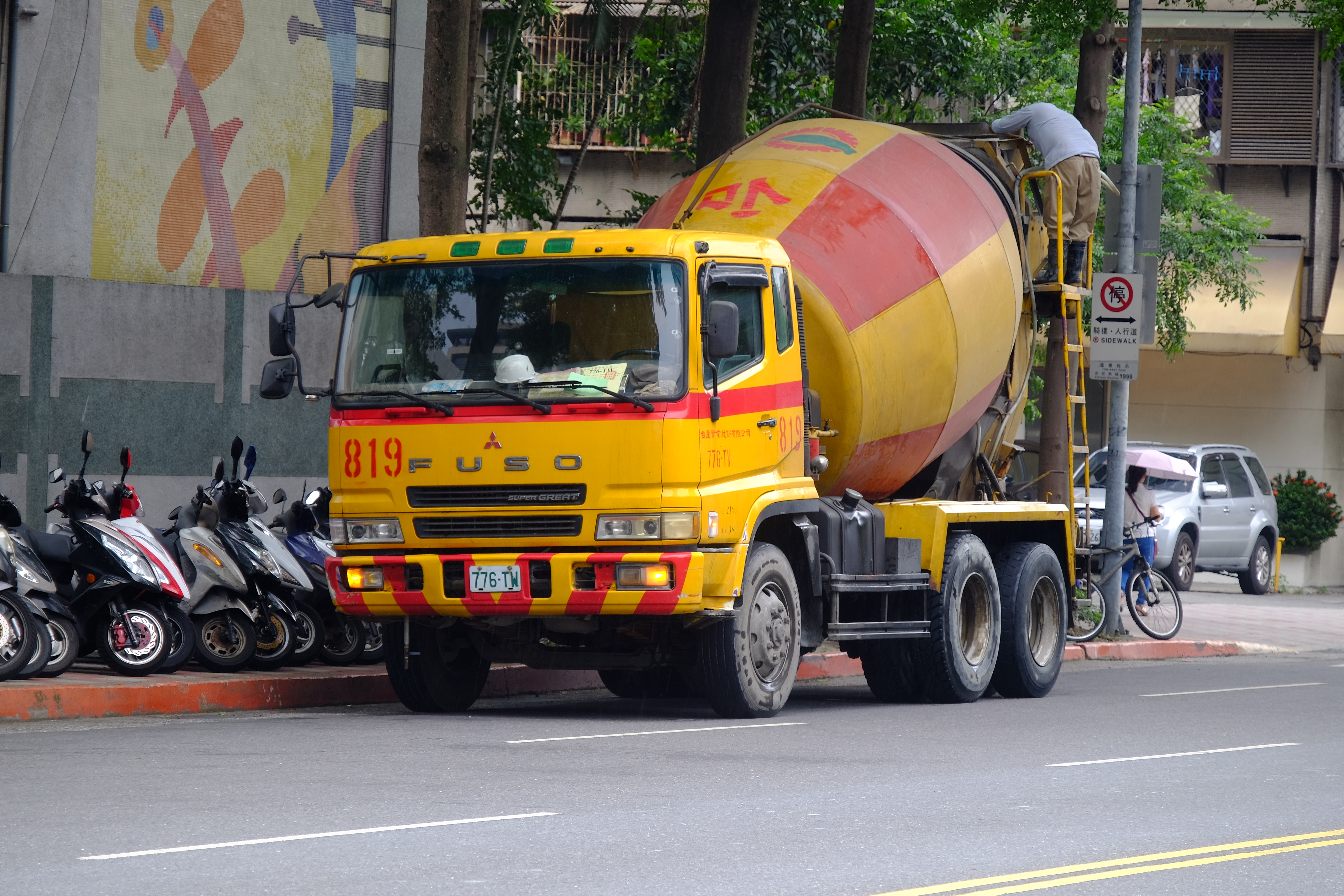 臺北市松山區三民路，西松國小東北角外的台產實業Fuso Super Great水泥攪拌車776-TW。